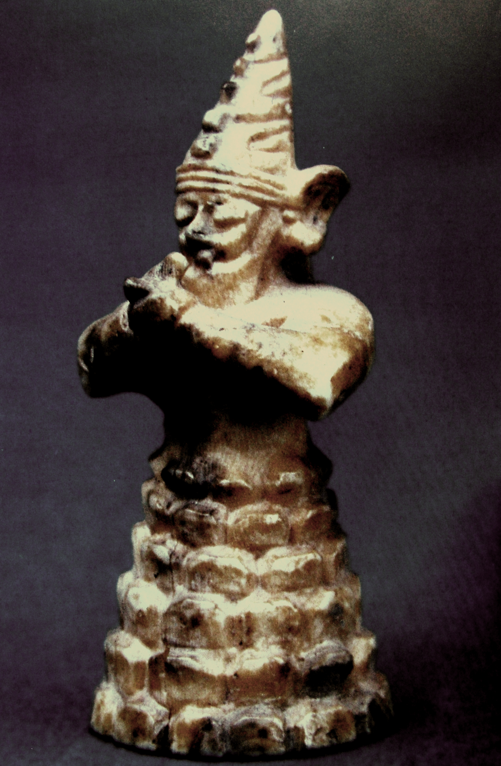 Elefántcsontisten-szobrocska Bogazköyből (Anatóliai Civilizációk Múzeuma, Ankara)